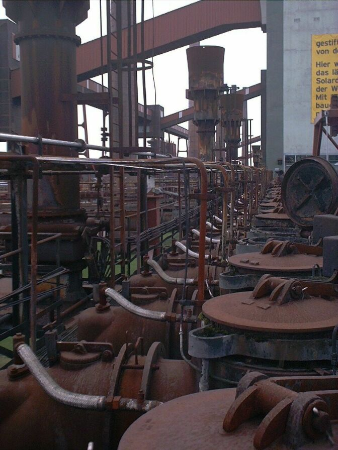 Gasverschlüse auf der stillgelegten Koksofenbatterie der Kokerei Zollverein, Essen